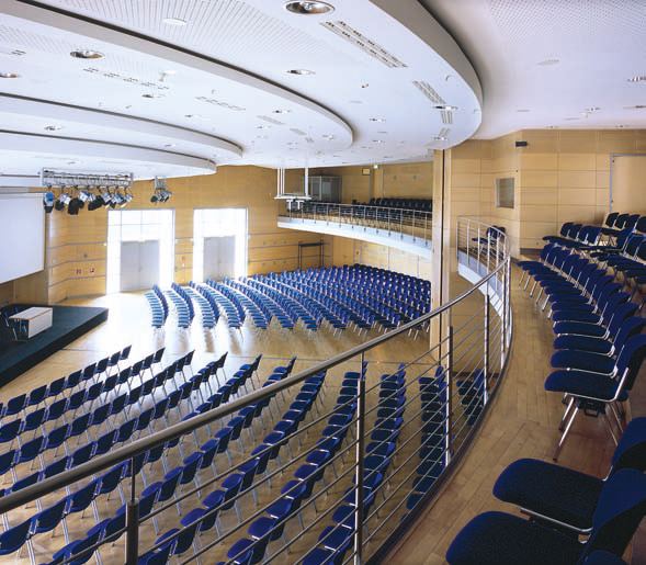 Blick in den Carl-Zeiss-Saal im Congress Center der Messe Erfurt